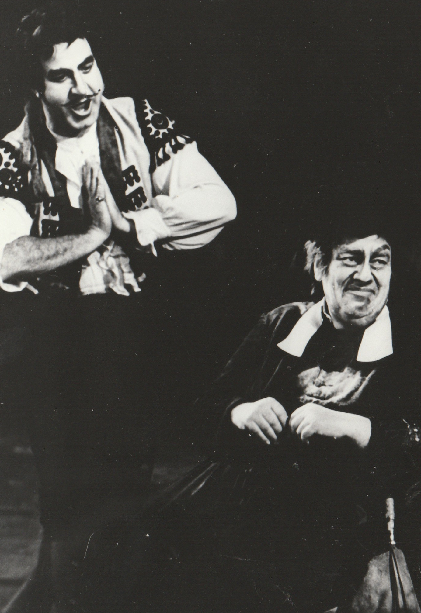 Domahidy László (1920–1996) operaénekes Don Basillio szerepében (Rossini: A sevillai borbély) Melis Györggyel.